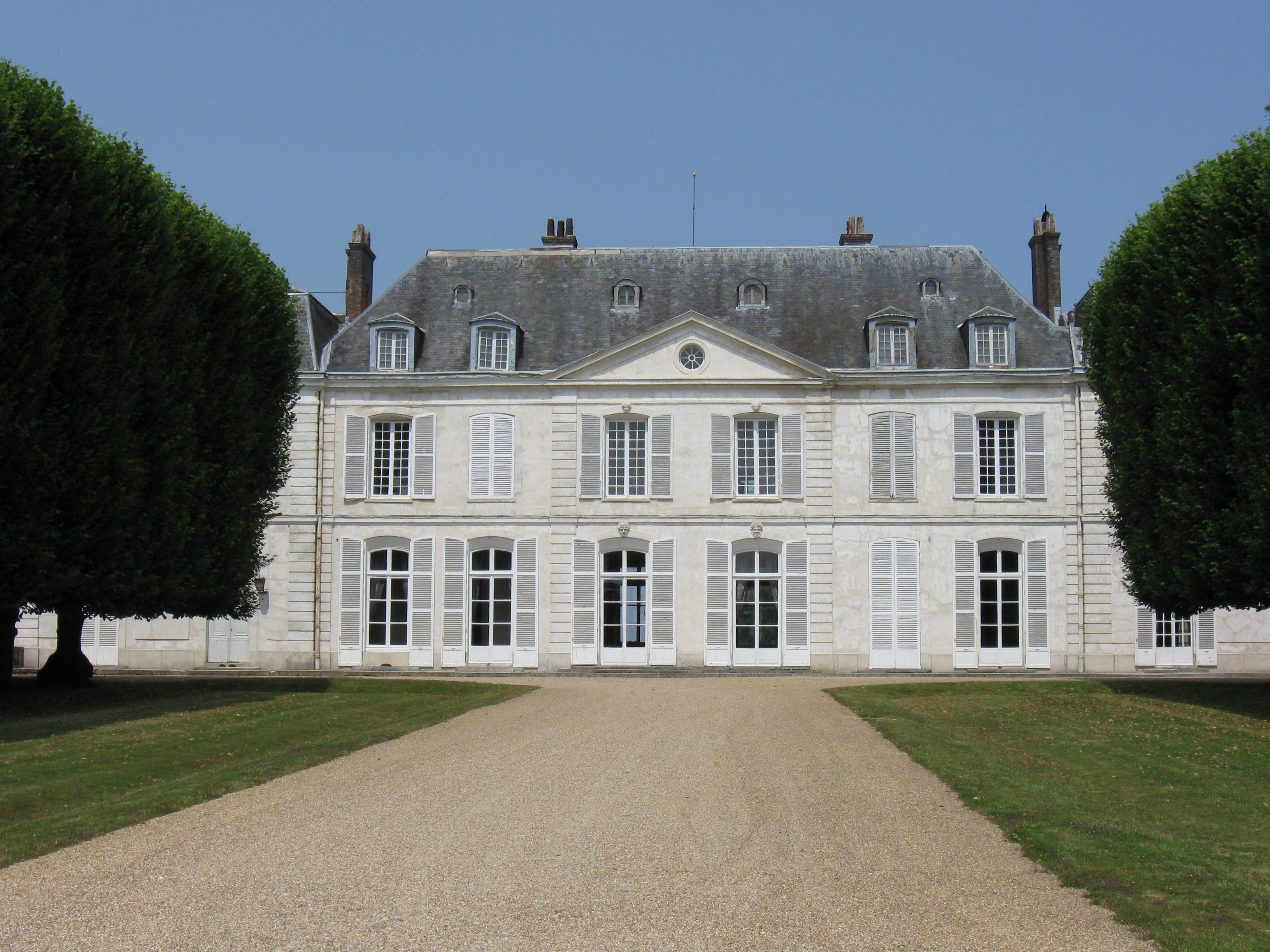 « Grand château » de Millemont. (commune de Millemont, département des Yvelines, région Île-de-France).